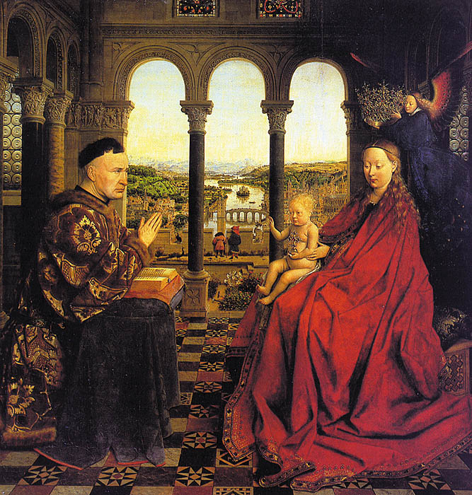 Der Maler zeigt uns die Vision des betenden Stifters, dem die Madonna erscheint. Detailreichen Landschaft im Hintergrund. Die perspektivische Darstellung, realisiert durch den Mosaikboden und dem weiten Ausblick ist hier schon vollständig durchkomponiert.